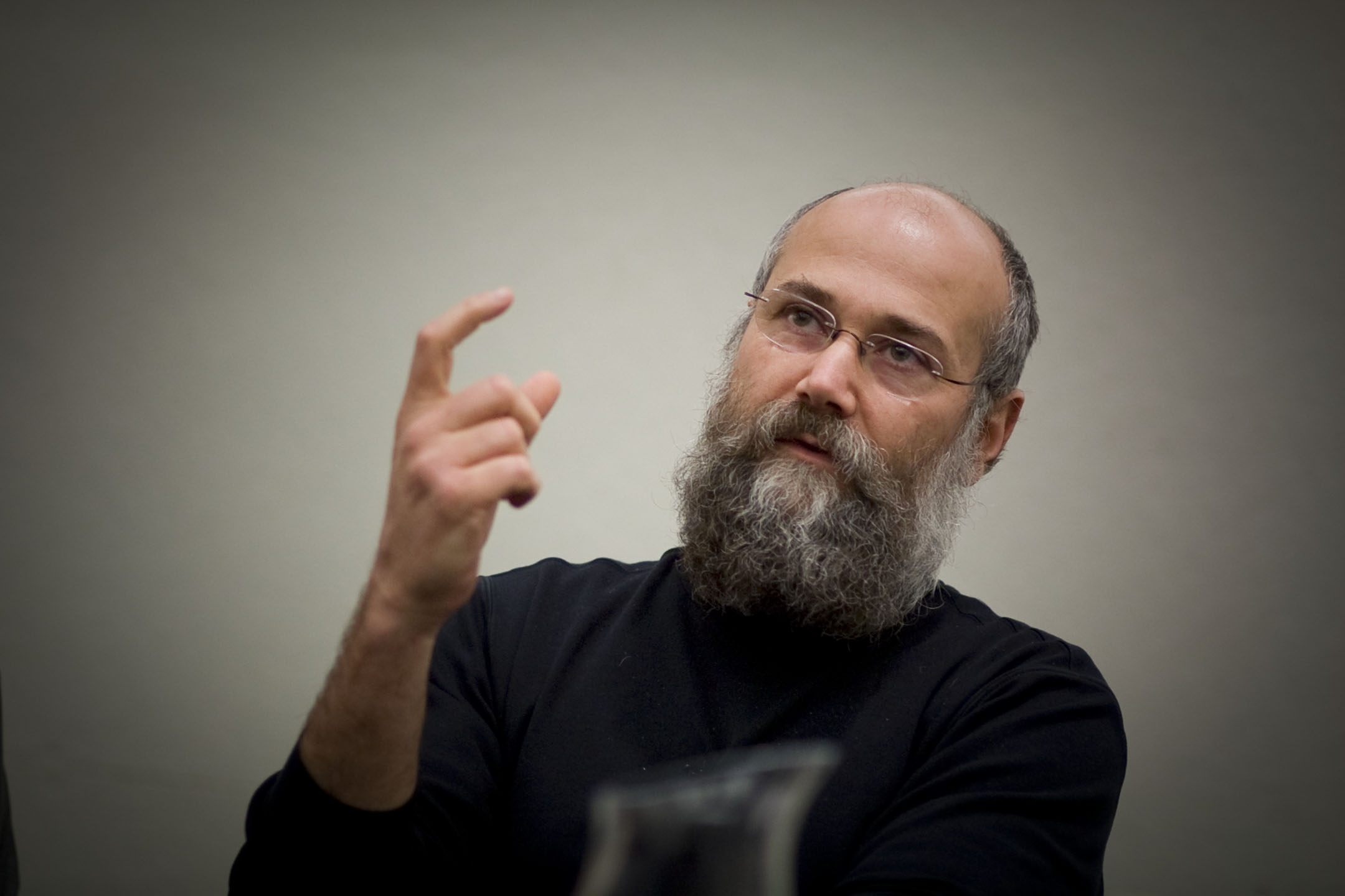 Yochai Benkler